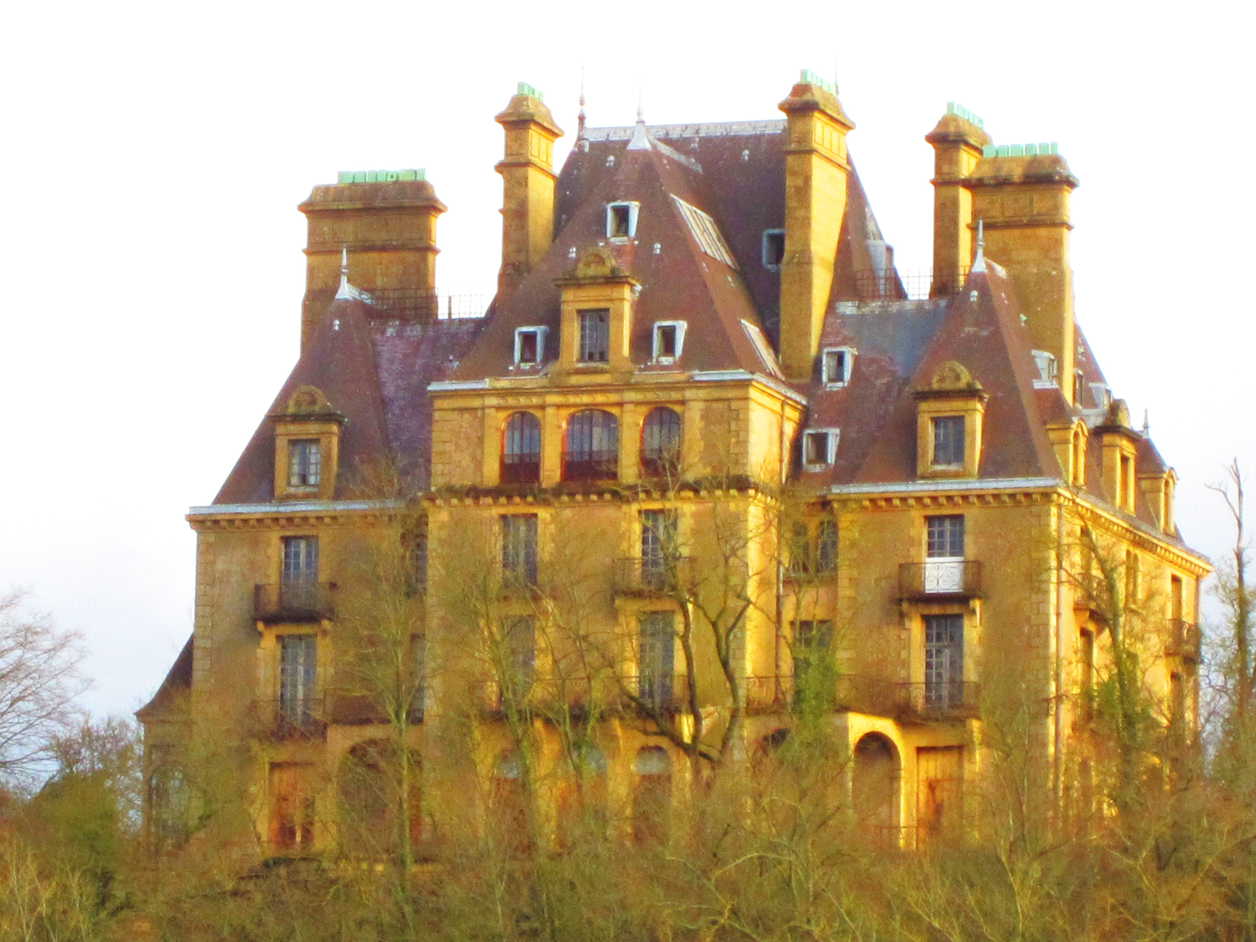 Description Château de Brouchetière, Jœuf, France (château construit après son mariage en 1905 pour Maurice de Wendel, dans le parc du château de son père, Henri de Wendel; construit par l'architecte Albert Jasson). Château de Brouchetière, Jœuf, France (château construit après son mariage en 1905 pour Maurice de Wendel, dans le parc du château de son père, Henri de Wendel; construit par l'architecte Albert Jasson).